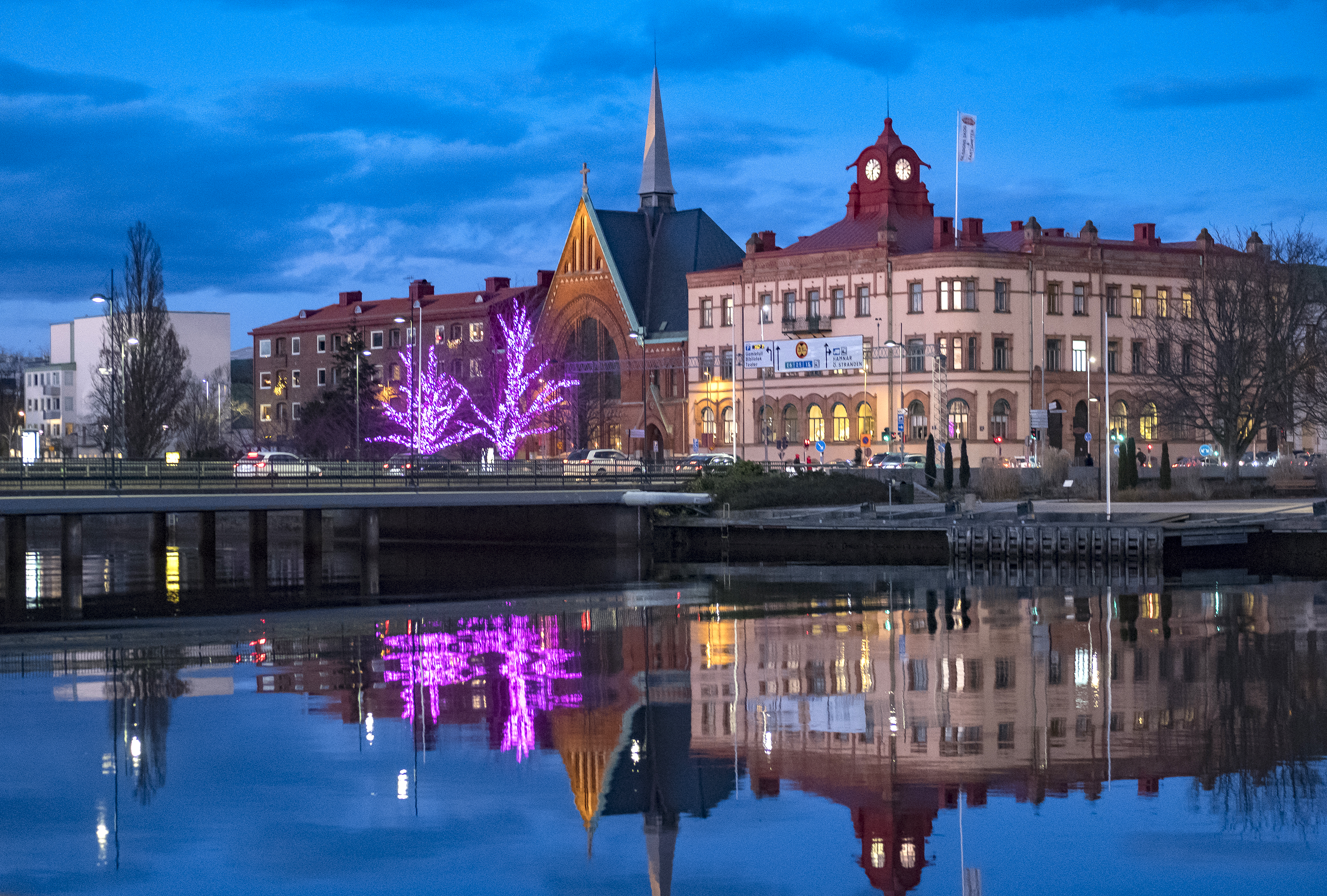 Slottsbron som går över ån Nissan i centrala Halmstad. Photo: News Øresund Johan Wessman. © News Øresund Johan Wessman (CC BY 3.0). Detta verk av News Øresund är licensierat under en Creative Commons Erkännande 3.0 Unported-licens (CC BY 3.0). Bilden får fritt publiceras under förutsättning att källa anges. .The picture can be used freely under the prerequisite that the source is given. News Øresund, Malmö, Sweden.News Øresund är en oberoende regional nyhetsbyrå som är en del av det oberoende dansk-svenska kunskapscentrat Øresundsinstituttet.